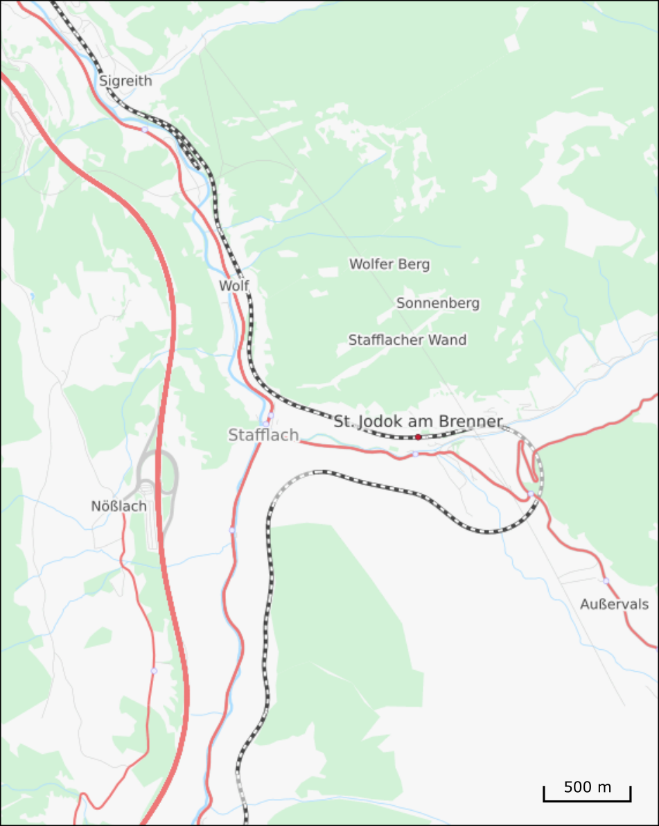 Seitentalkehre der Brennerbahn bei St. Jodk am Brenner